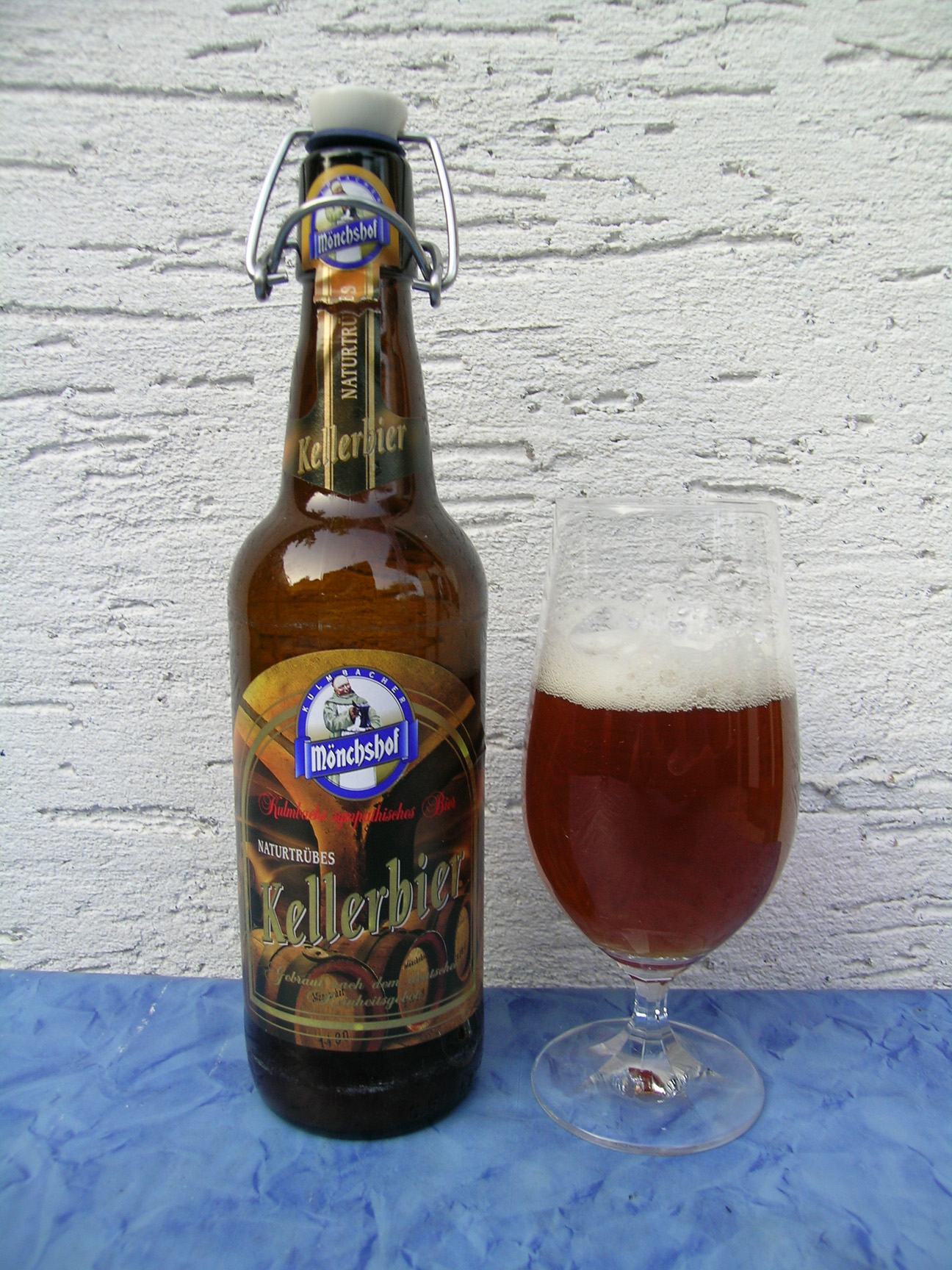 Monschof Kellerbier